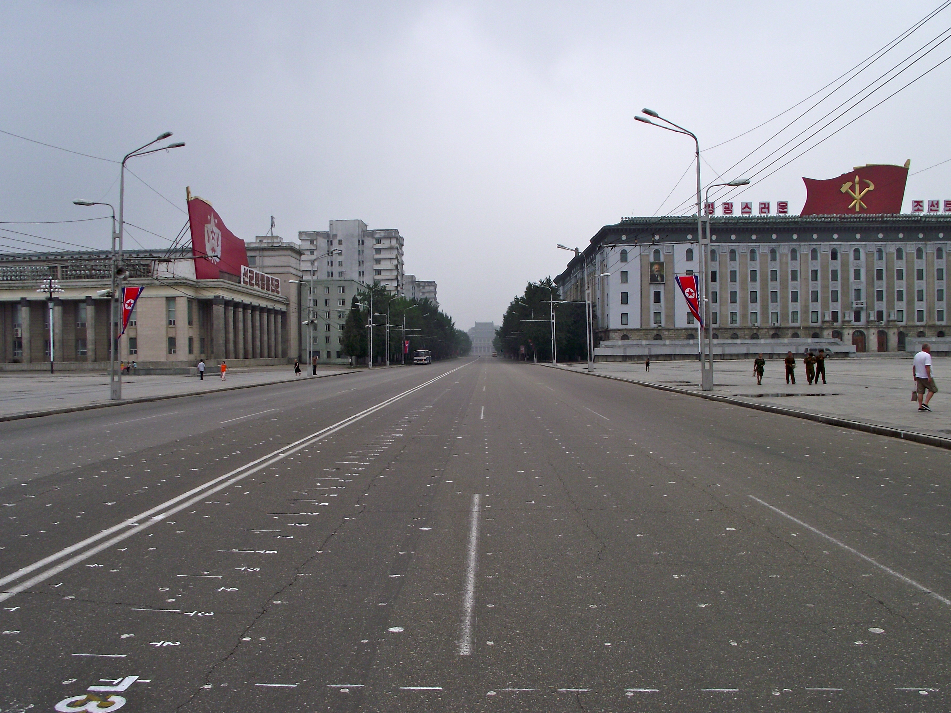 Sungri Street